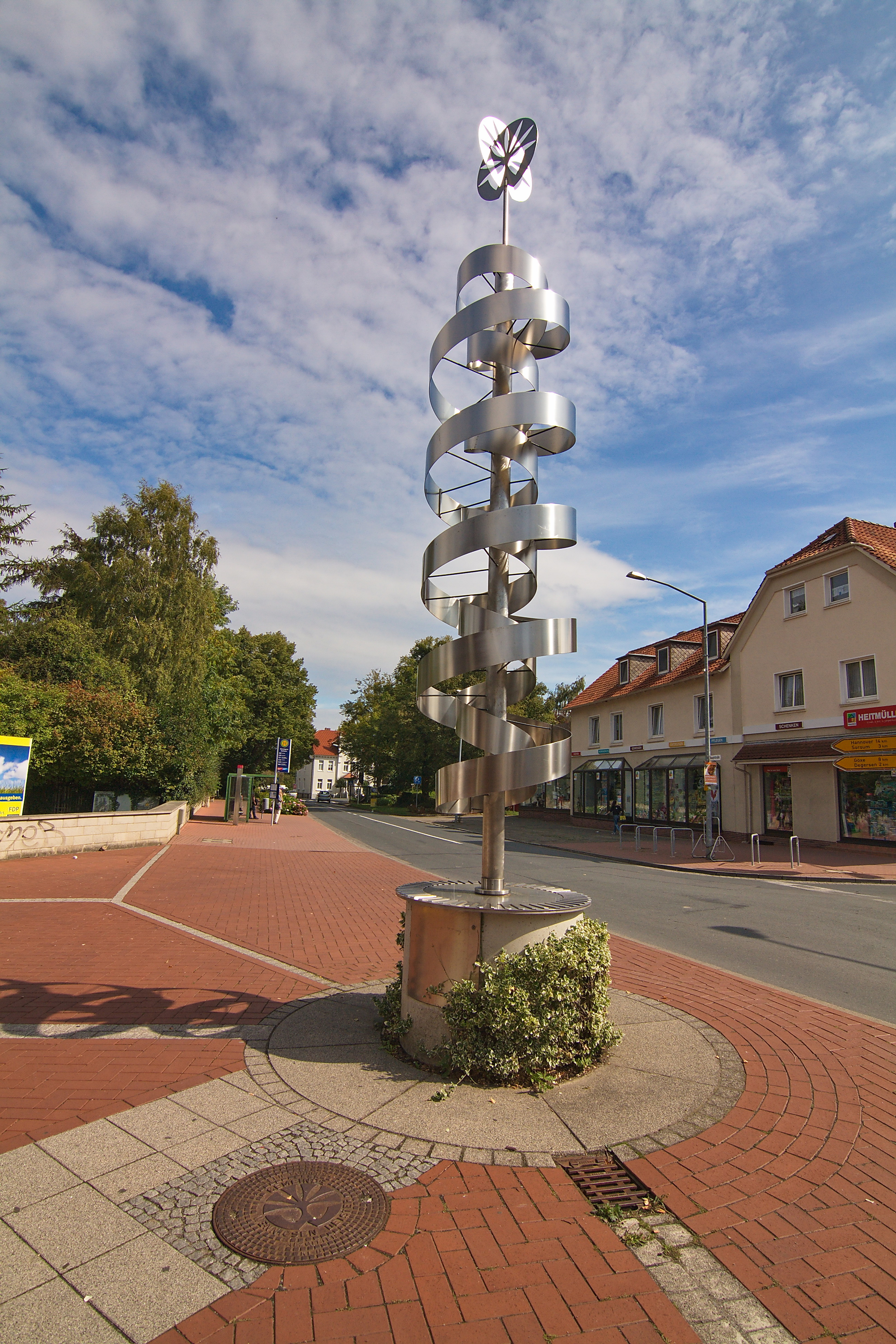 Doppelhelix-Spirale des Lebens von Erich Pollähne in Wennigsen, Niedersachsen, Deutschland